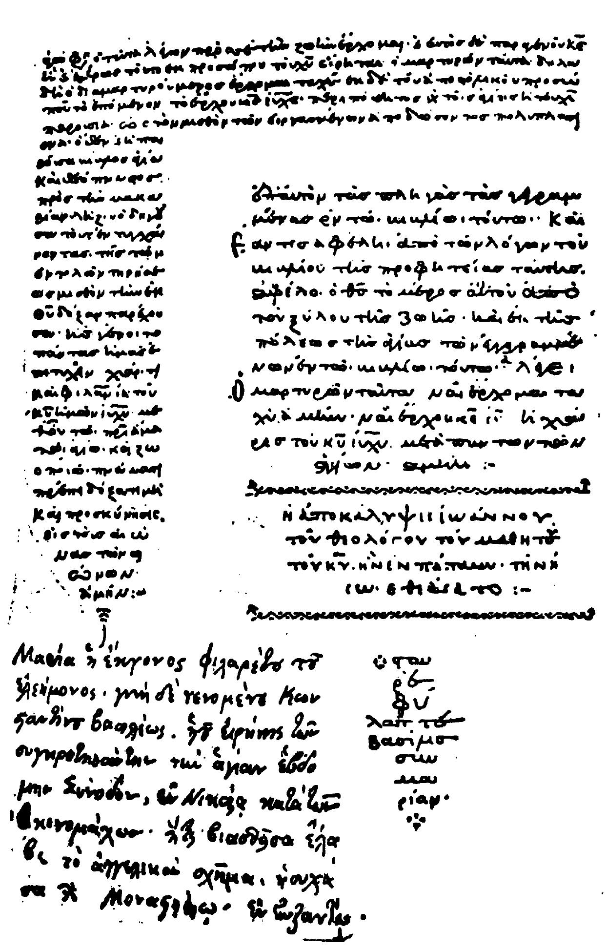 Inschrift in Griechisch